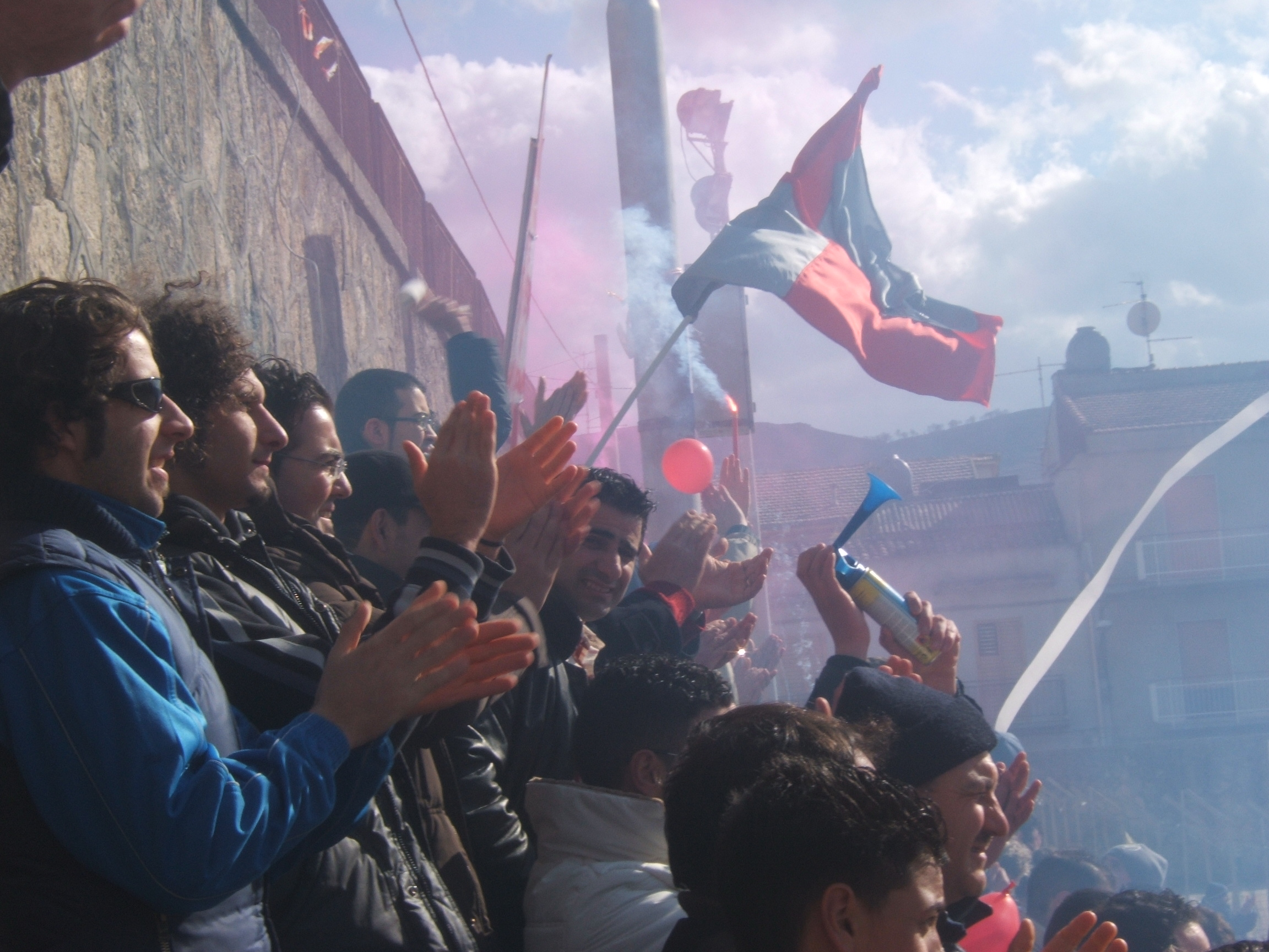 Foto di Carmelo Parrinelli